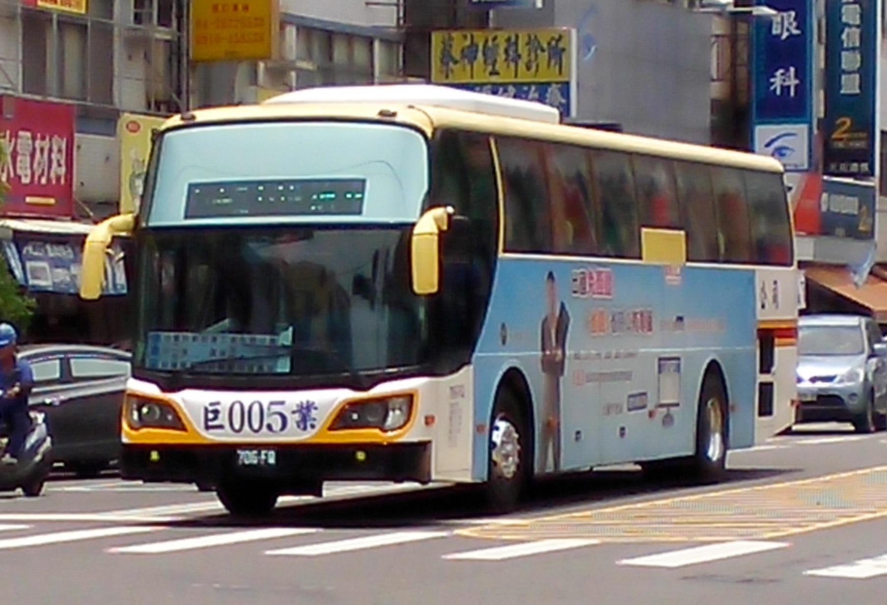 巨業交通大宇FX118大客車706-FQ營運台中市公車169路，行駛於台中市清水區中山路。